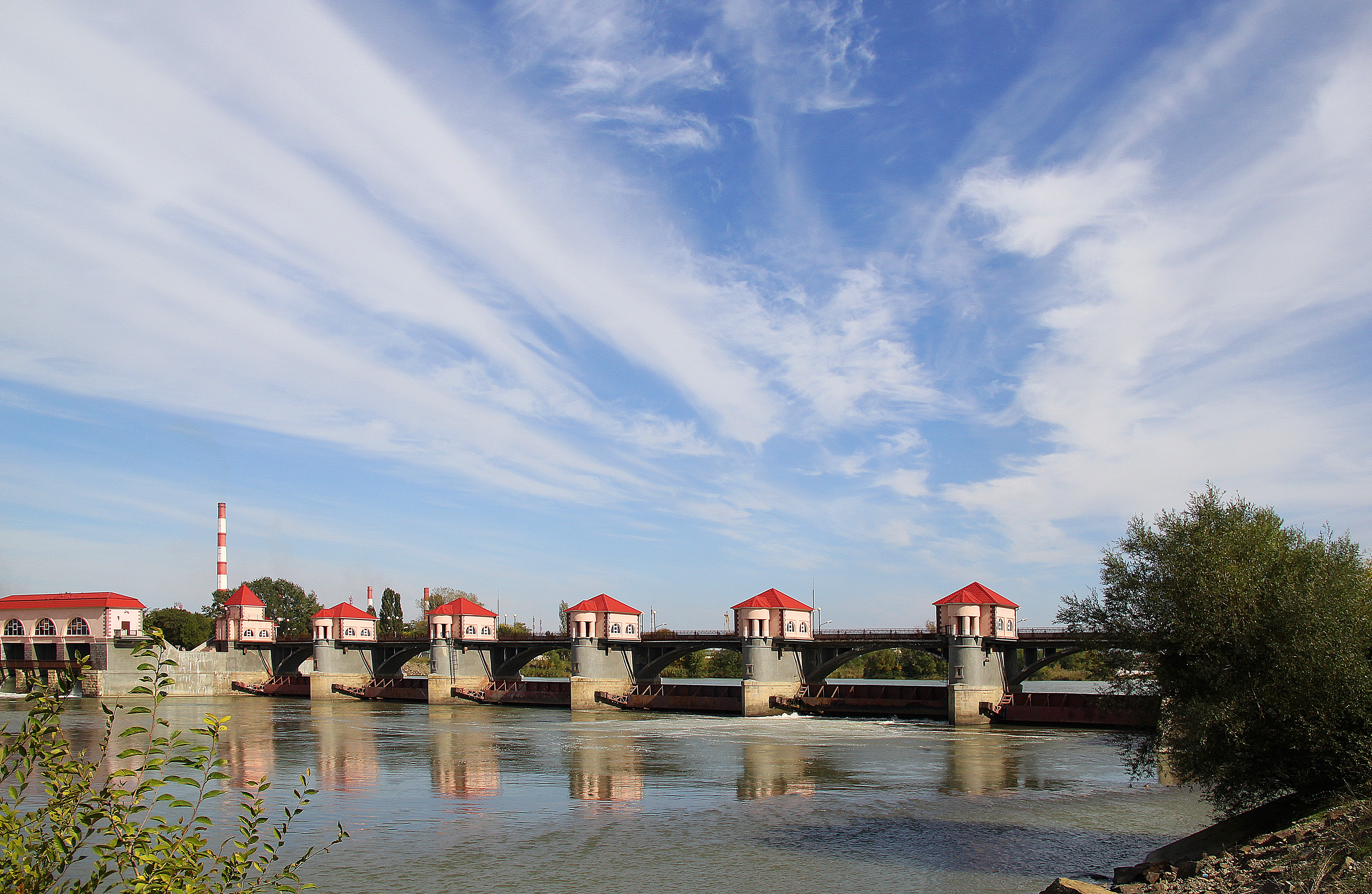 Головное сооружение Невинномысского канала, сооруженного в 1936-1948 гг. для орошения кубанской водой засушливых земель Ставрополья: северо-западная часть города, р.Кубань, Невинномысск, Ставропольский край